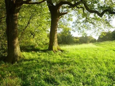 Hattingens älteste erhaltene Bauwerke: 20 vermutlich jungsteinzeitliche Grabhügel in Holthausen, die bislang nicht erforscht wurden (kein Denkmalschutz bestehend). Lage: Hattingen/Ruhr, OT Holthausen, nähe Kleingartenanlage Salzweg vulgo "Billes Kopf"